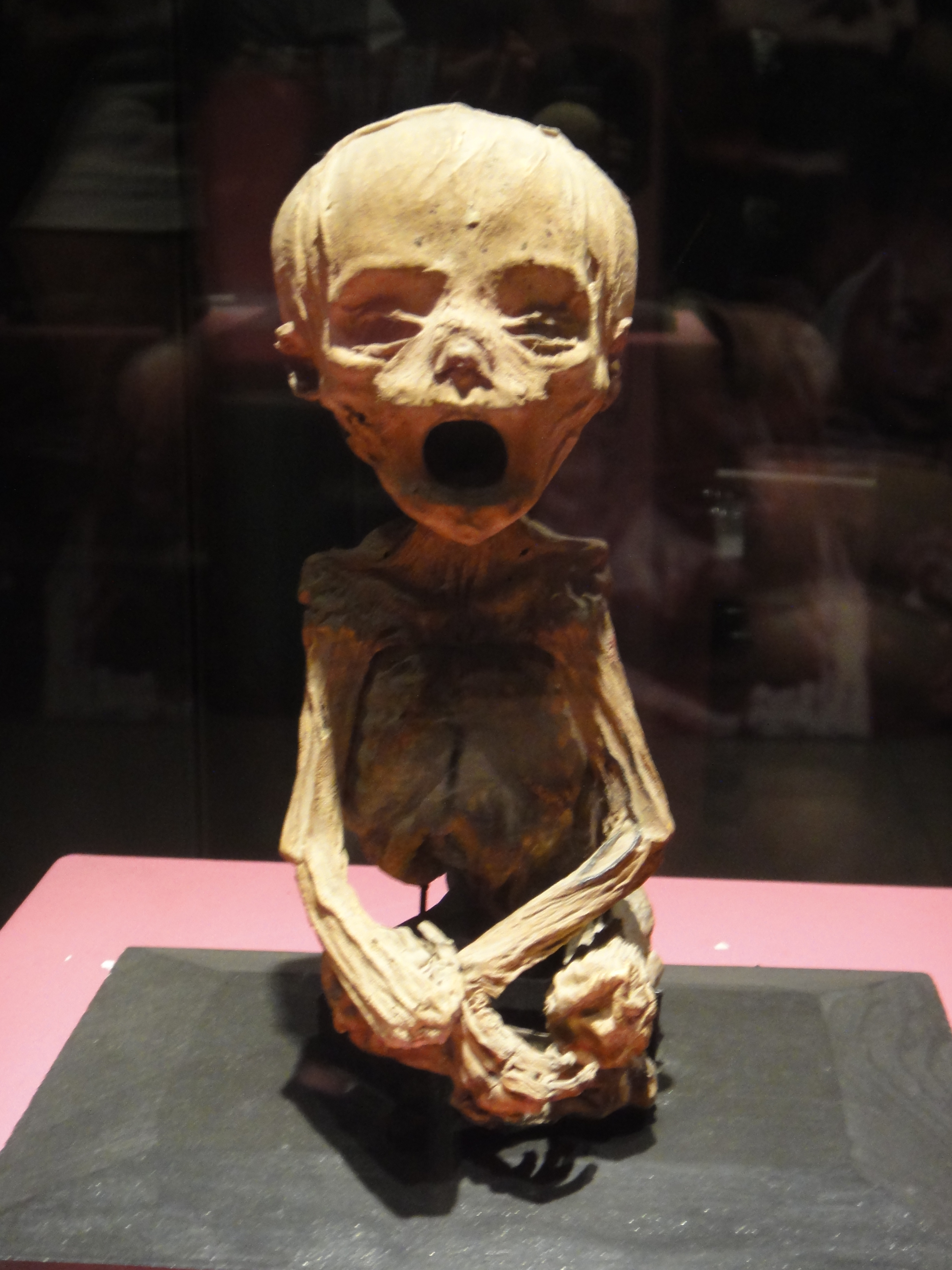 MOmias de Guanajuato, en un museo un poco retirado del centro de la ciudad